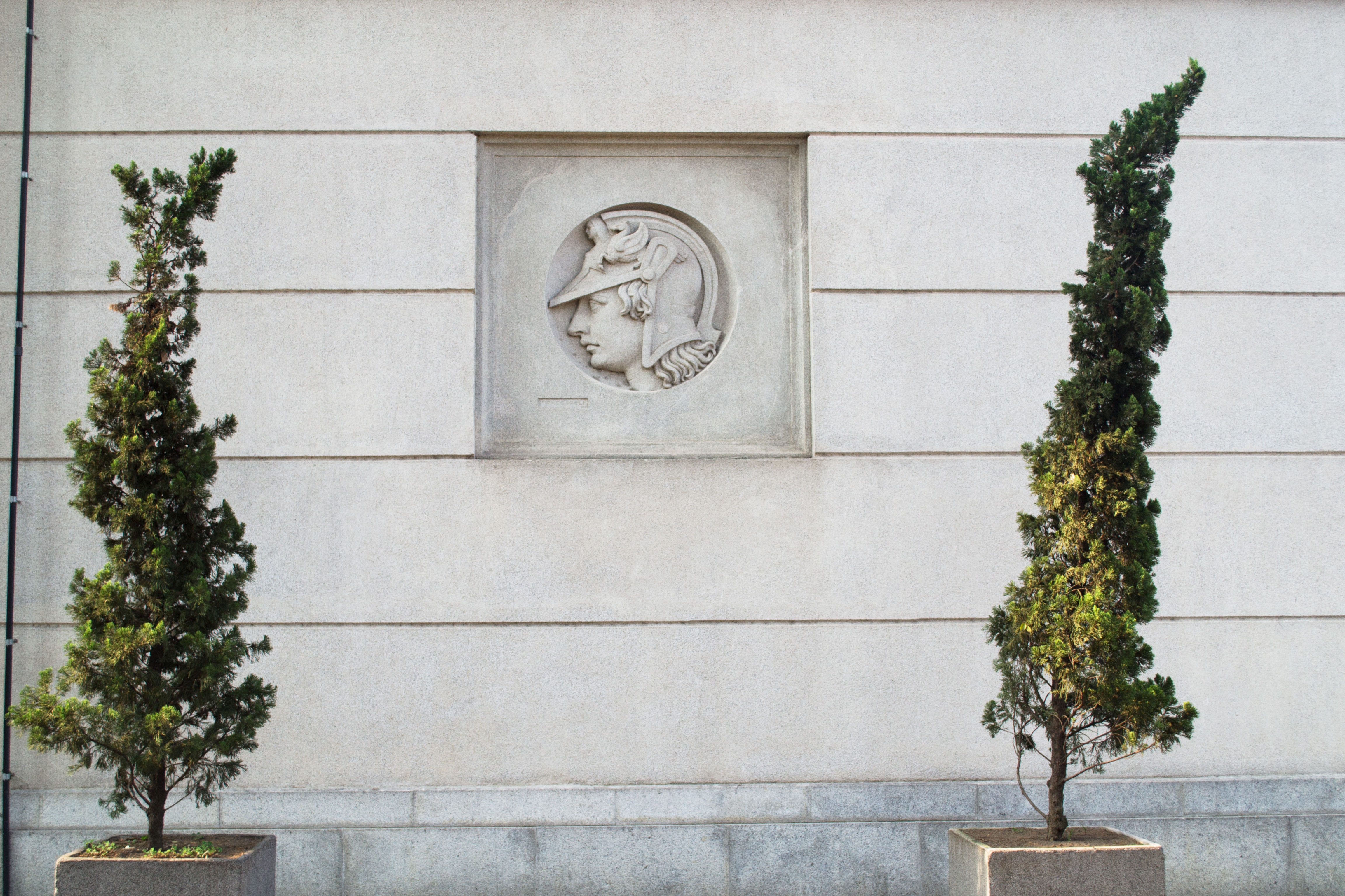 Primeiro detalhe da lateral esquerda da antiga Escola Politécnica, atual Faculdade de Tecnologia do Estado de São Paulo, em São Paulo (SP), Brasil